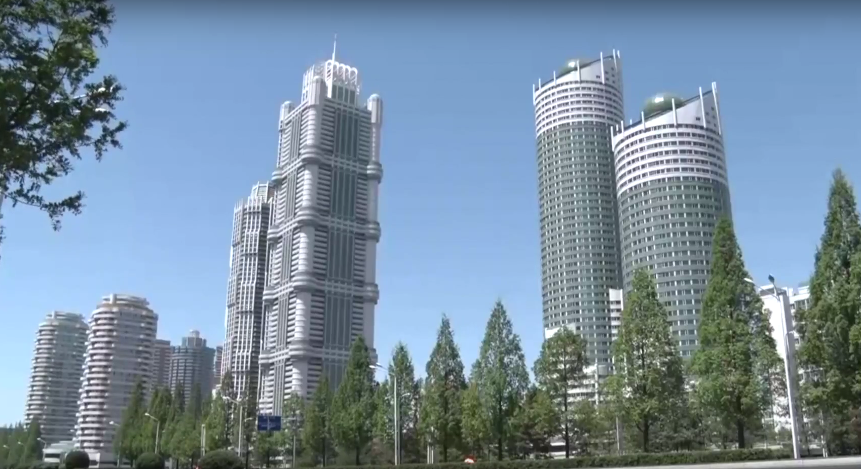 Po lewej stronie Najwyższy wieżowiec na Ryomyong Street sięgający 240 metrów wysokości i 70 pięter i obok niego 55 piętrowy wieżowiec. Po prawej stronie 50 i 35 piętrowe wieżowce.